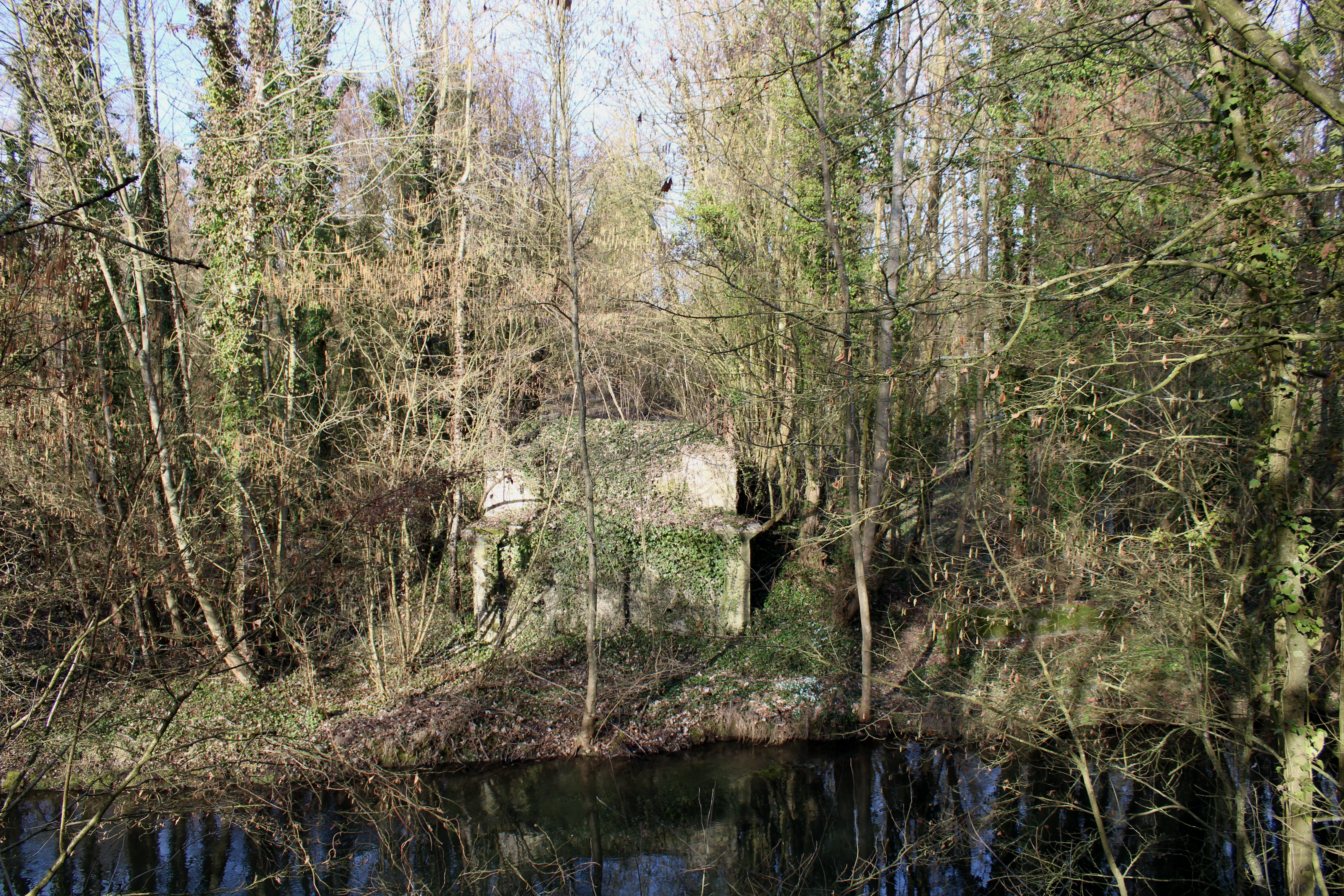 Vestiges du pont qui traversait le canal.